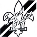 Logo du Festival Fleudelisé, créé en 1990